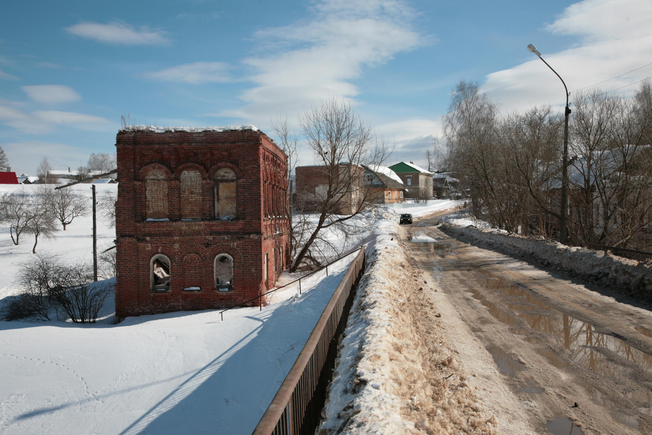 (Тверская область, Торжок, село Выдропужск)